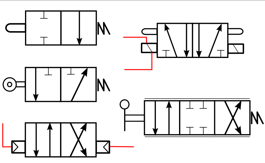 modèles courant de distributeurs. Models of pneumatics or hydraulics distributors